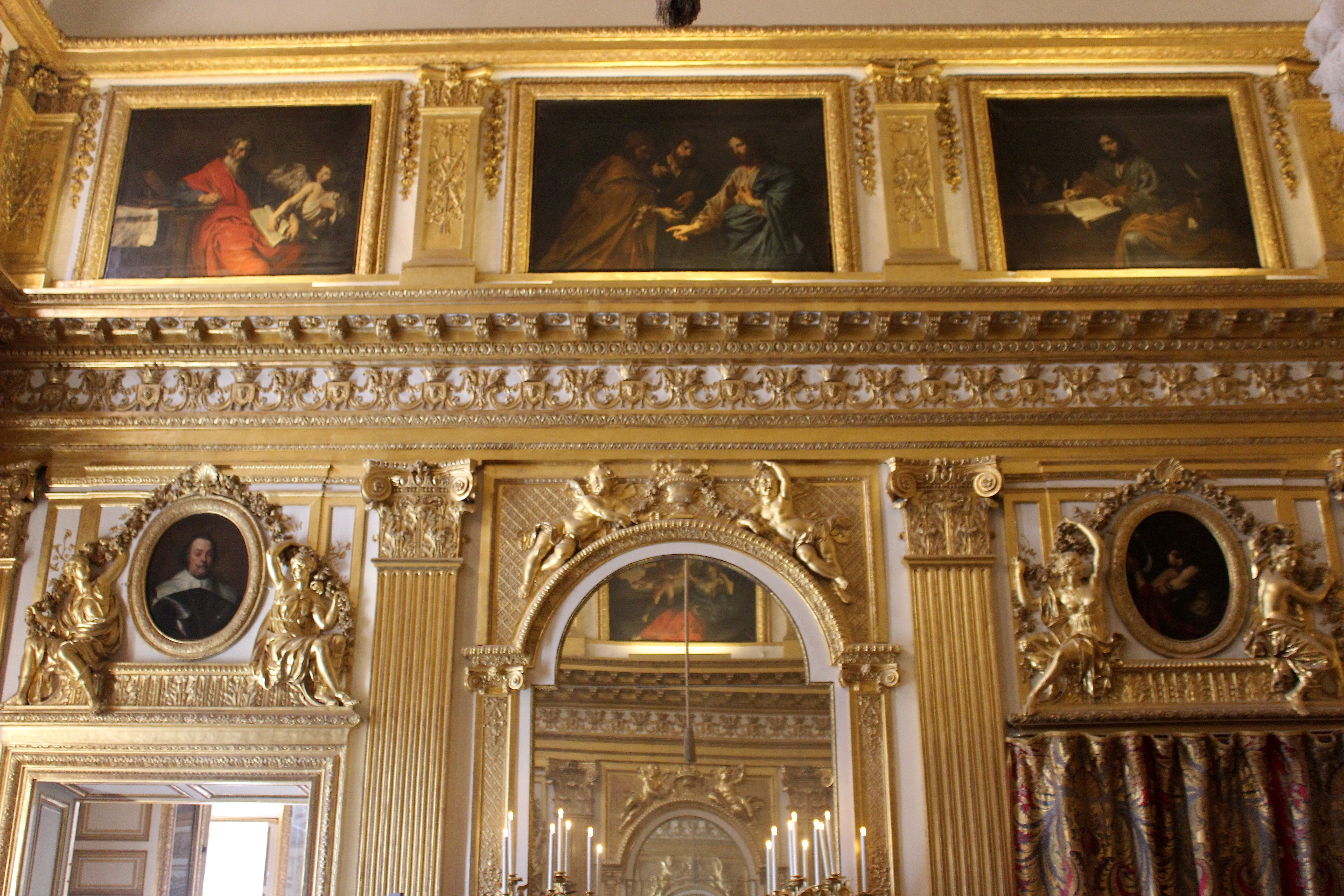 Chambre du roi. Versailles. .